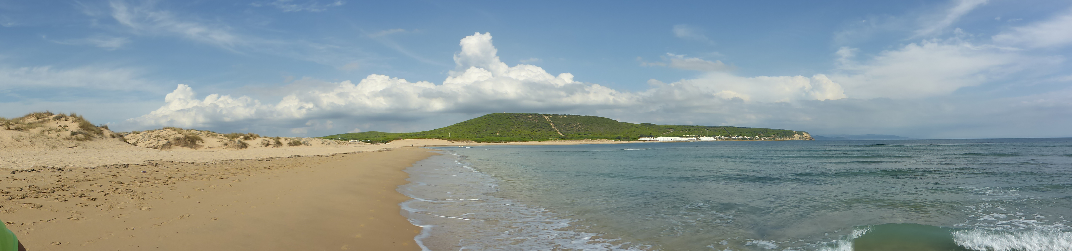 Pinar de la Breña (Barbate, España)